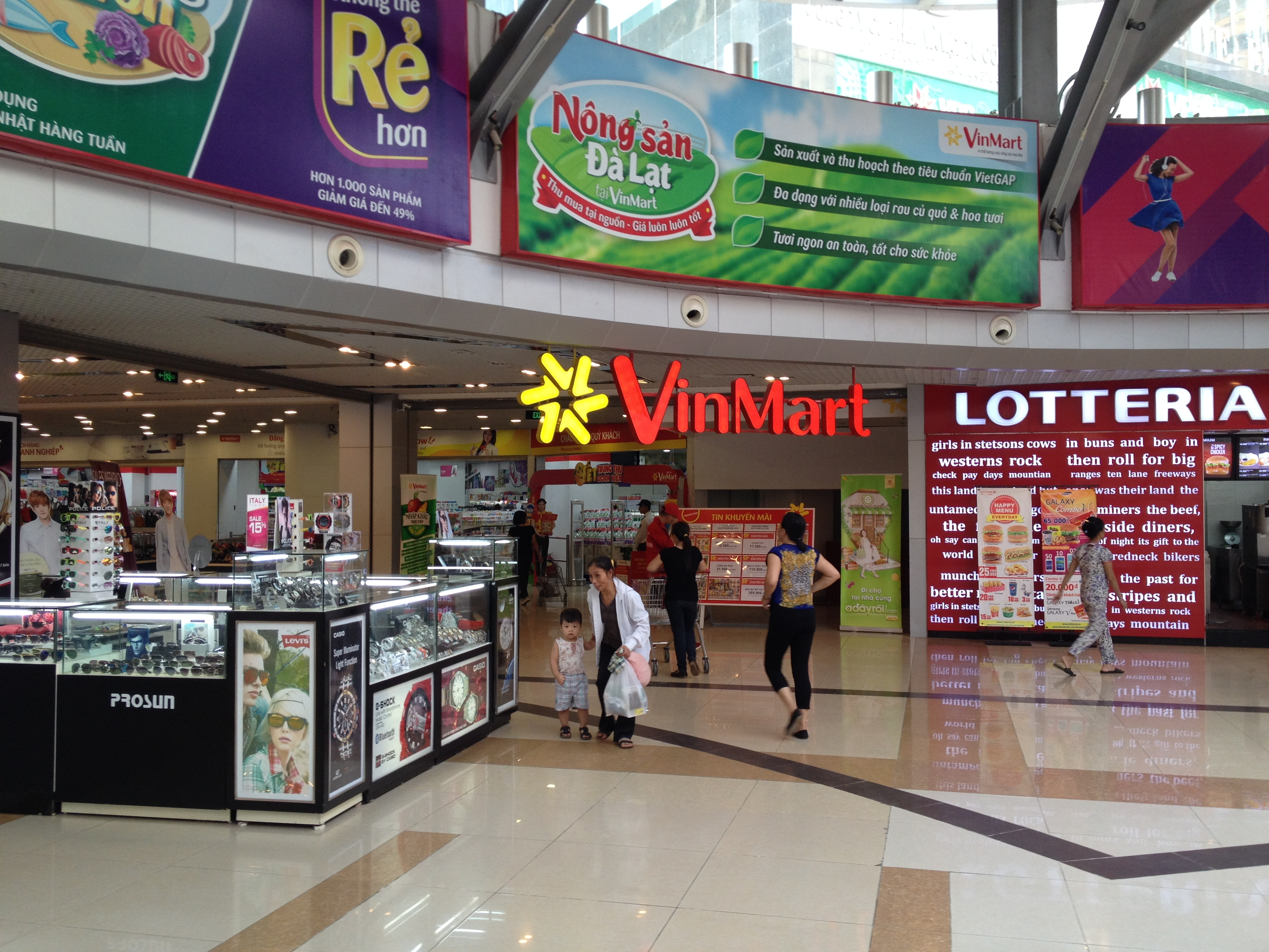 Đường Hoàng Đạo Thuý, Hà Nội, Việt Nam.